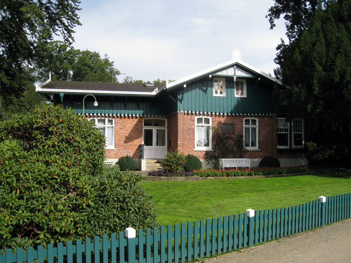 Schweizerhaus in Bremen.Das abgebildete Objekt ist ein geschütztes Kulturdenkmal in der Freien Hansestadt Bremen, mit der Nr. 0218,T002 beim Landesamt für Denkmalpflege registriert.